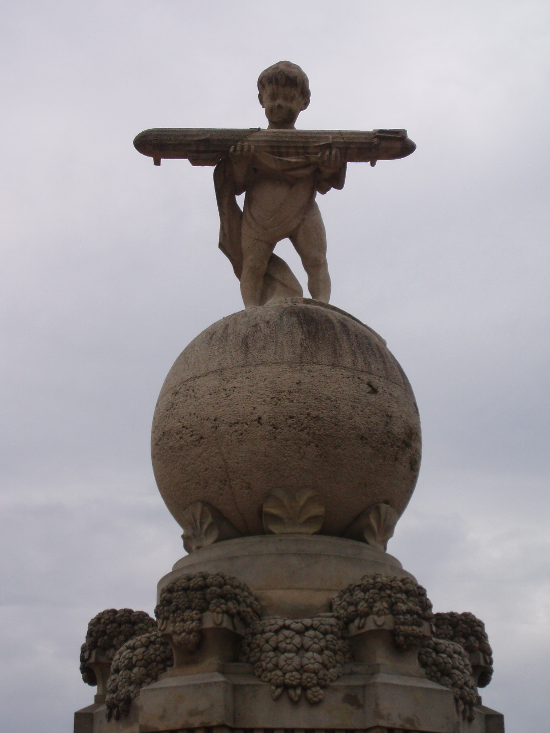 Detail des Zeppelinbrunnens von Bruno Diamant